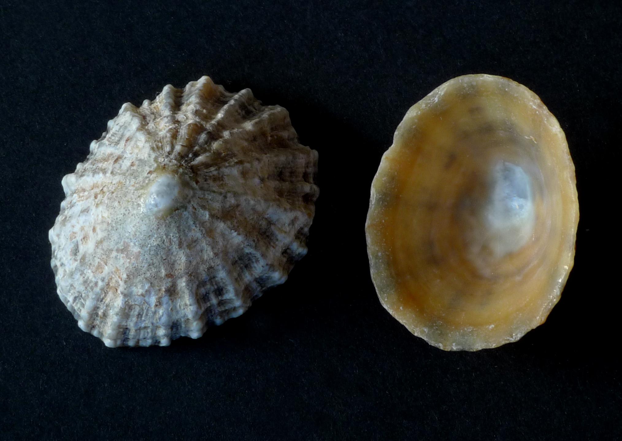 Patella vulgata - Gemeine Napfschnecke